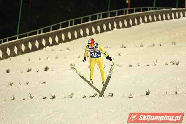 Kamil Stoch during saturday competition of FIS Ski Jumping World Cup in Zakopane, 2012